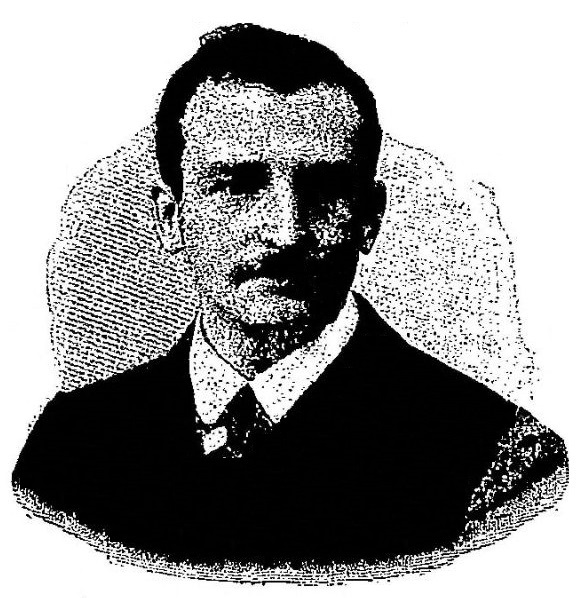 Eugène Balme, tireur, 1902.